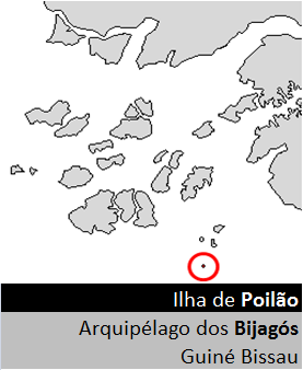 Localização da Ilha de Poilão ,dentro do Arquipélago dos Bijagós (Guiné Bissau,Africa Ocidental)